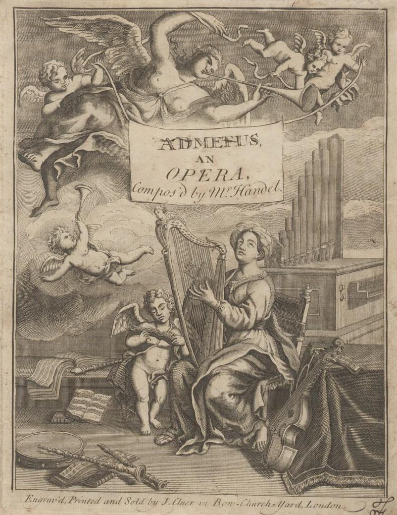 Händel, Georg Friedrich: Admetus, an opera / Compos’d by Mr. Handel. - [Partitur]. - London : John Cluer, [1727].